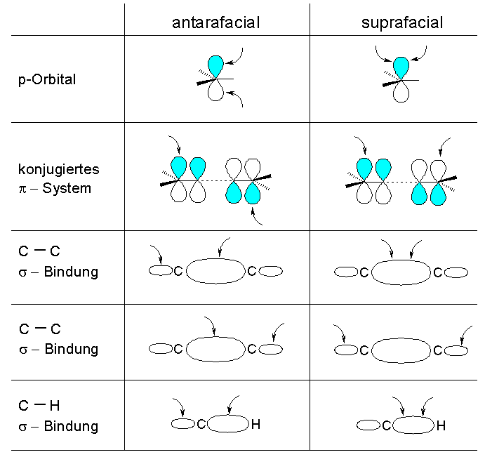 Schema eines suprafacialen und antarafacialen Reaktionsweges